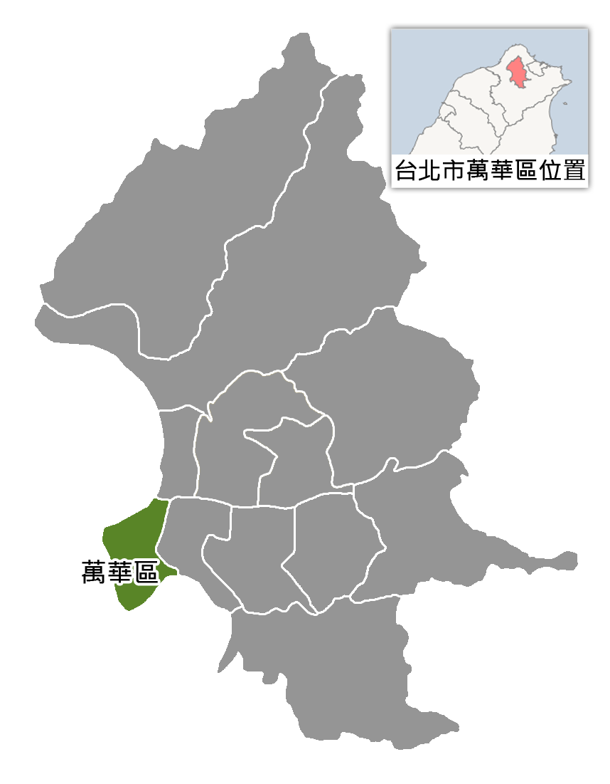 台北市萬華區位置